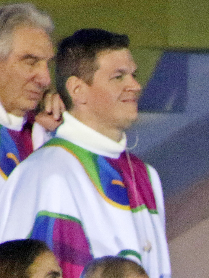 Ceremonia de inauguración de los Juegos Panamericanos Lima 2019